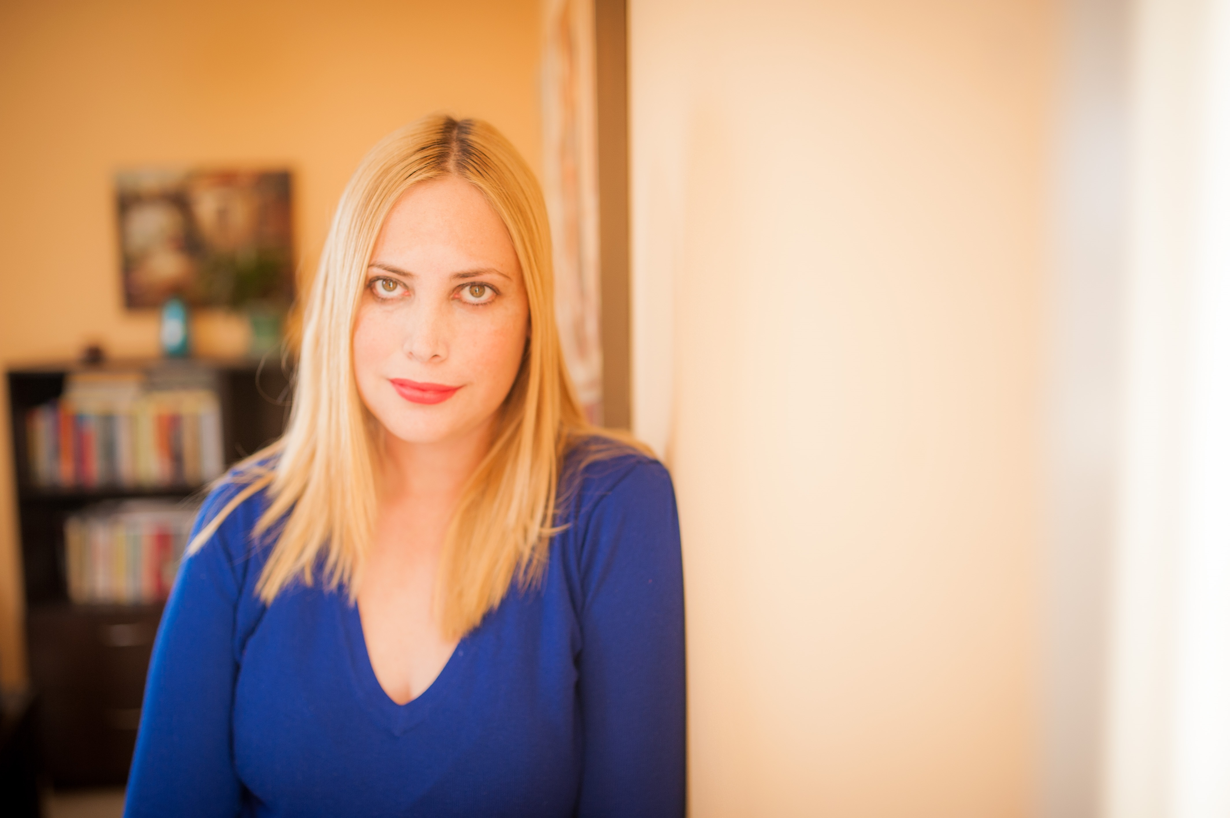 נועה רום